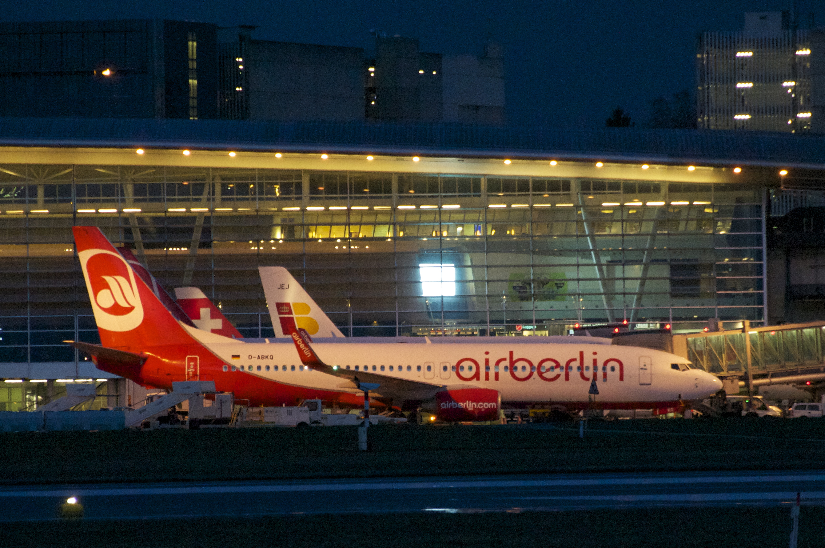 Air Berlin Boeing 737-800; D-ABKQ@ZRH;10.03.2013/695bb